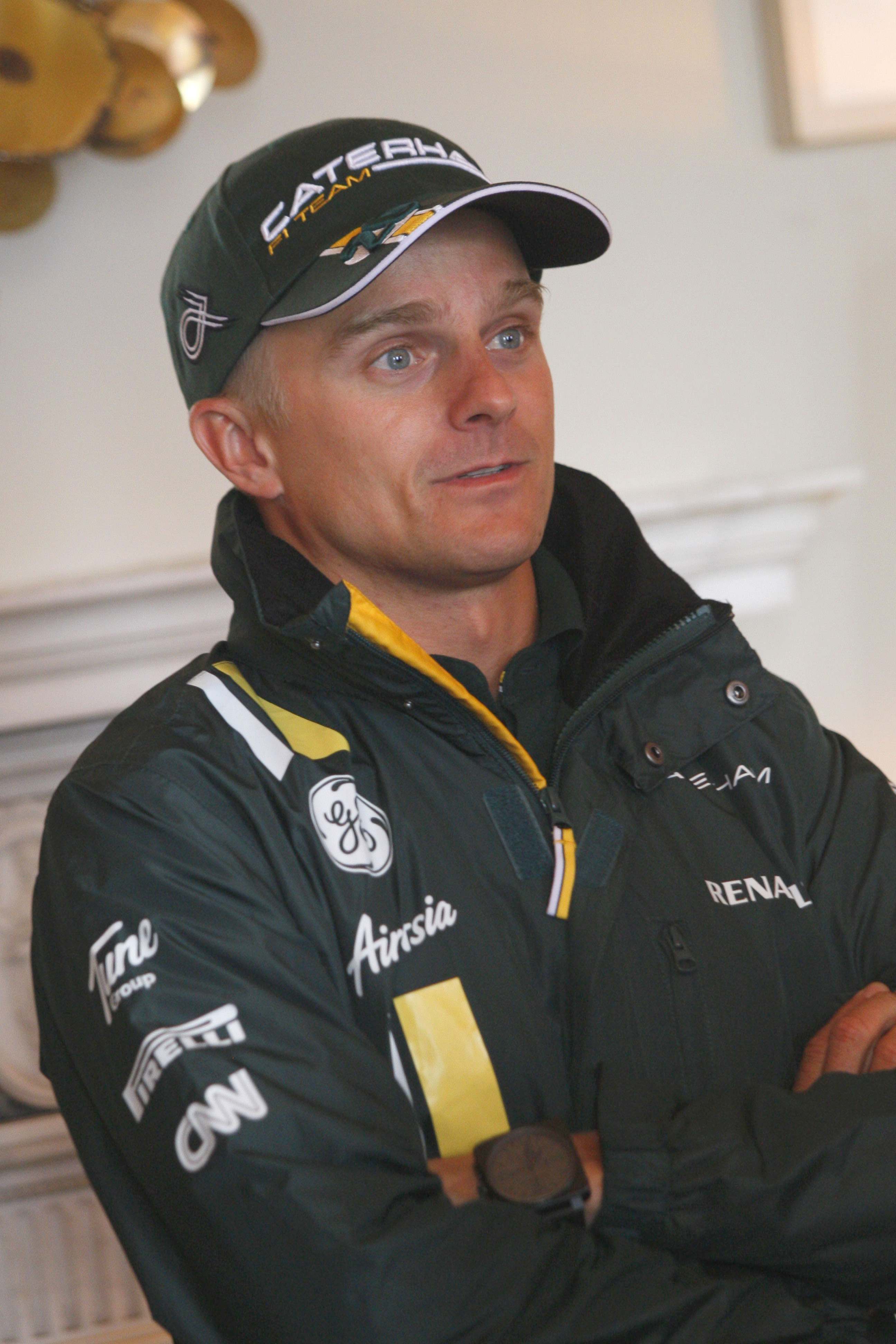 Heikki Kovalainen by Dell